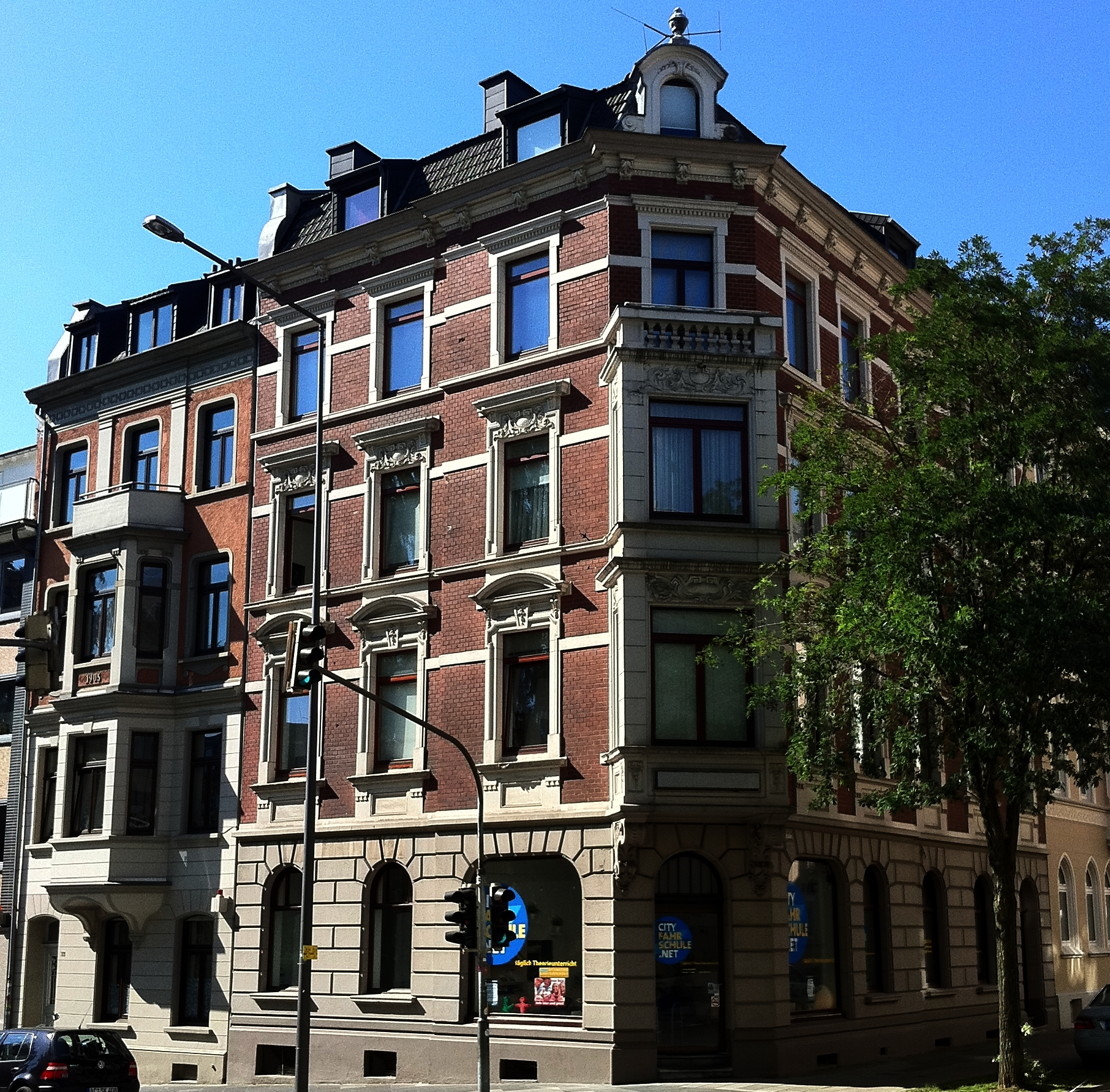 Fassade des Hauses Rochusstraße 48 / Ecke Sandkaulstraße. Architekt: Arnold Königs um 1903